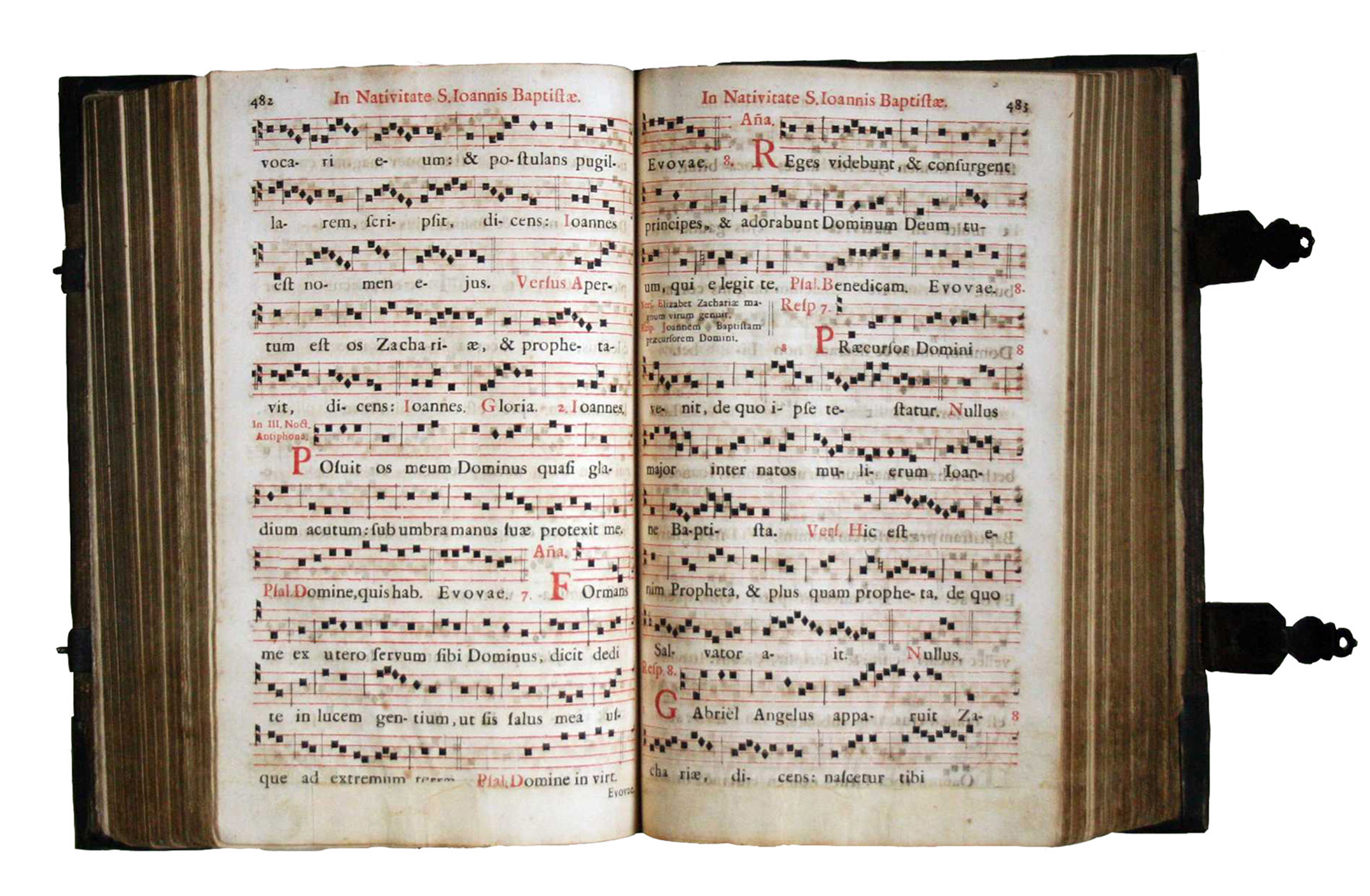 Kodex